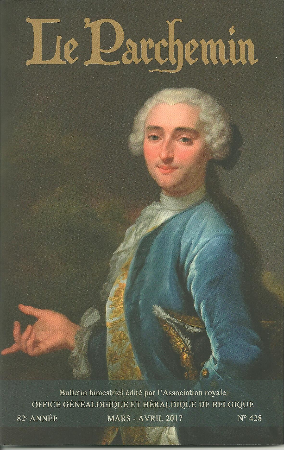 Comte Jean d'Oultremont de Wégimont, 1715-1782 lieutenant colonel des Dragons, qui administra la principauté de Liège pour son frère, le Prince-évèque. Louis XV écrivit de lui: "..le citoyen le plus distingué et le plus illustre de sa Principauté."